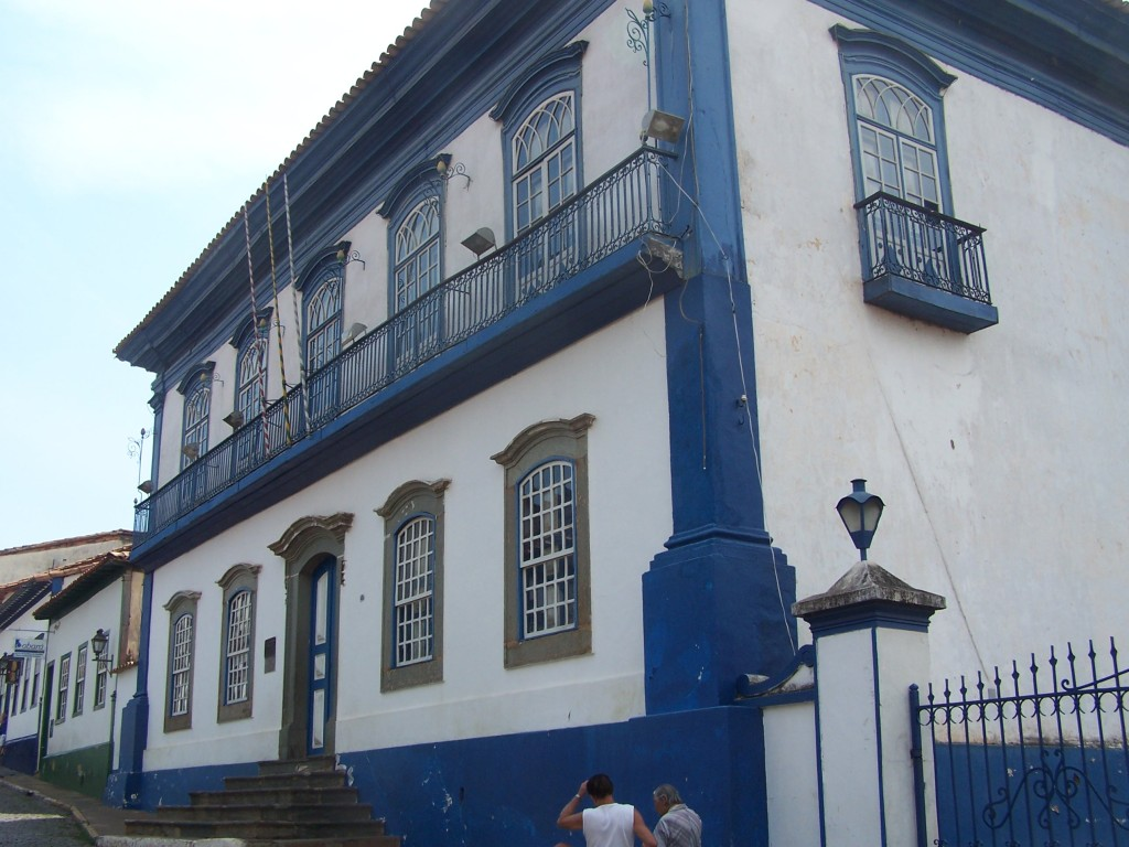 Solar Padre Correia, prefeitura de Sabará - Minas Gerais, Brasil.